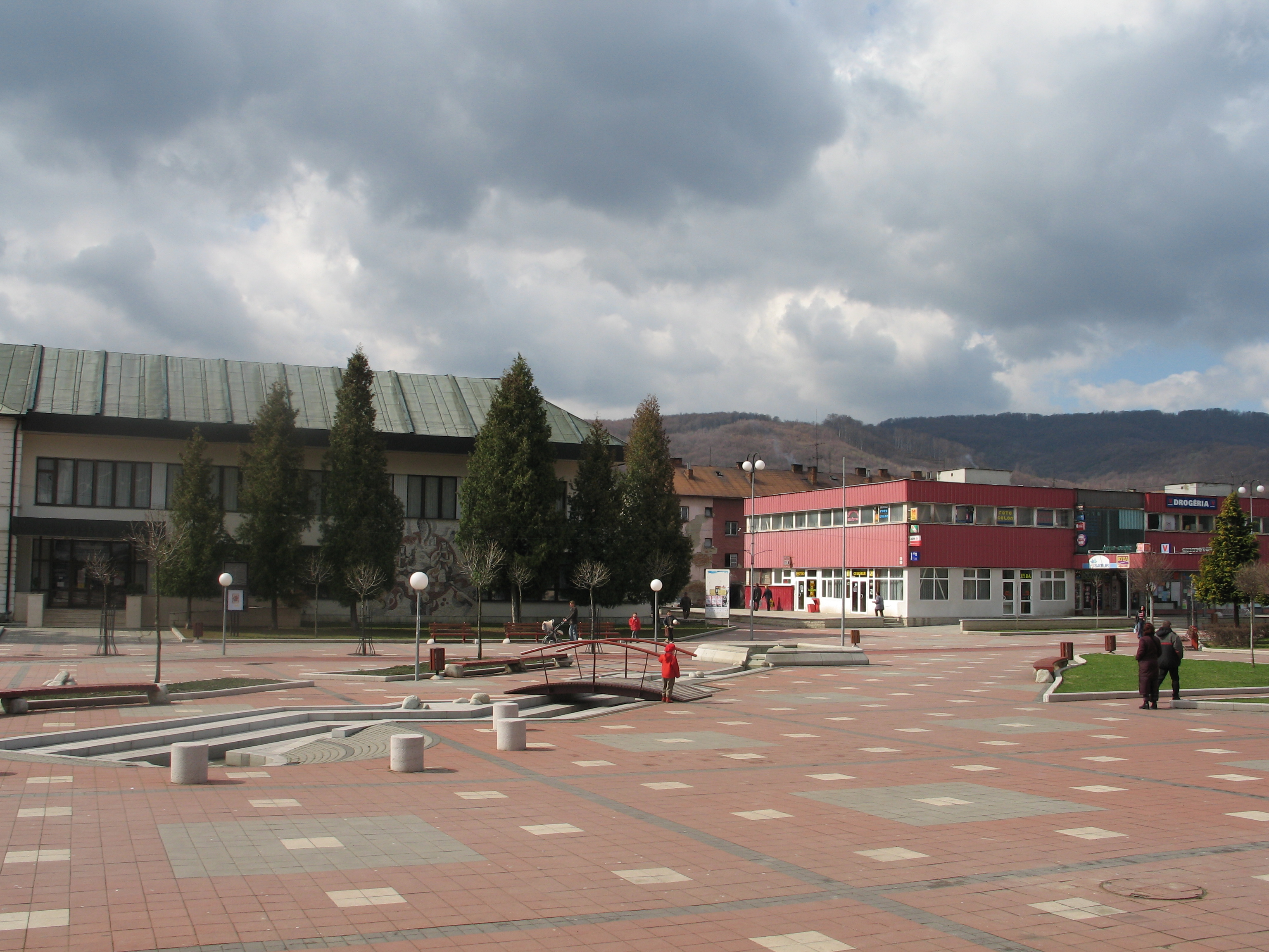 Atraktívna časť centrálnej mestskej časti Svidníka